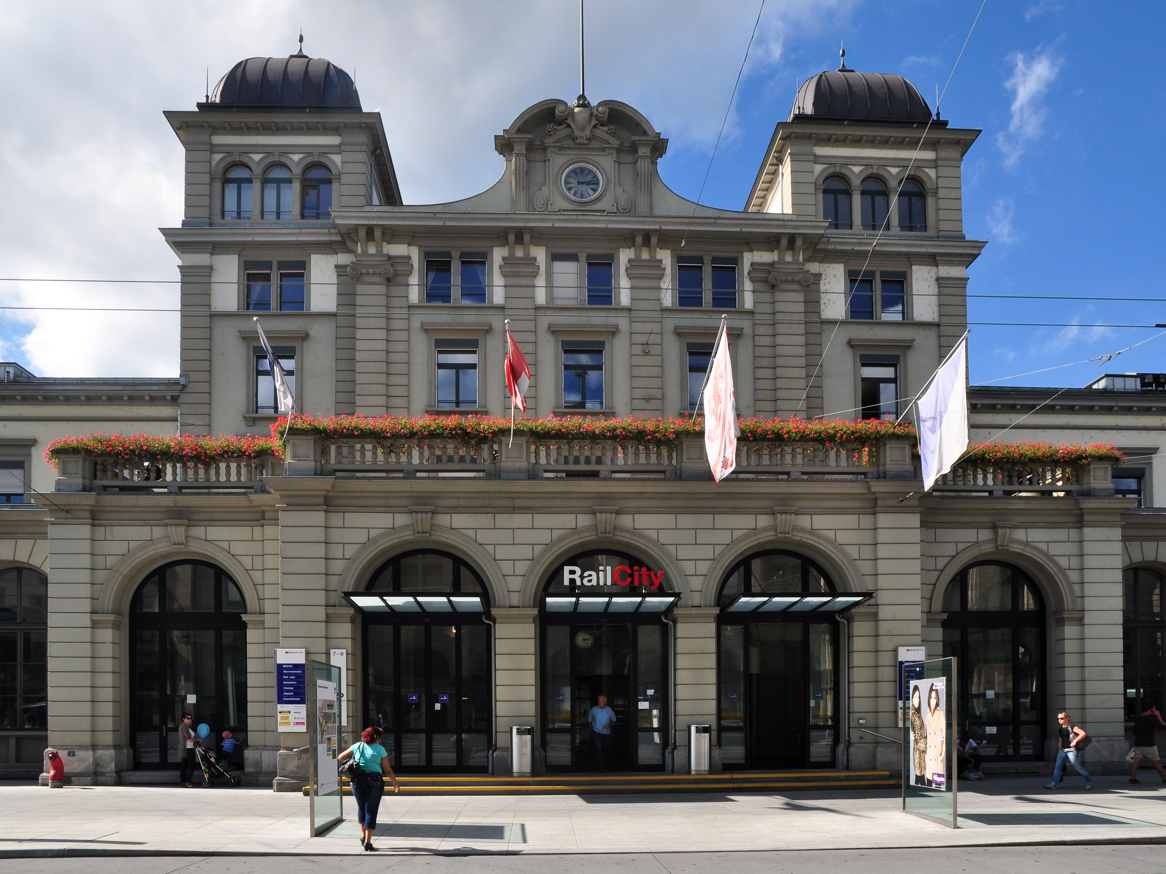 Hauptbahnhof Winterthur, Bahnhofplatz 5–9 in Winterthur (Switzerland)